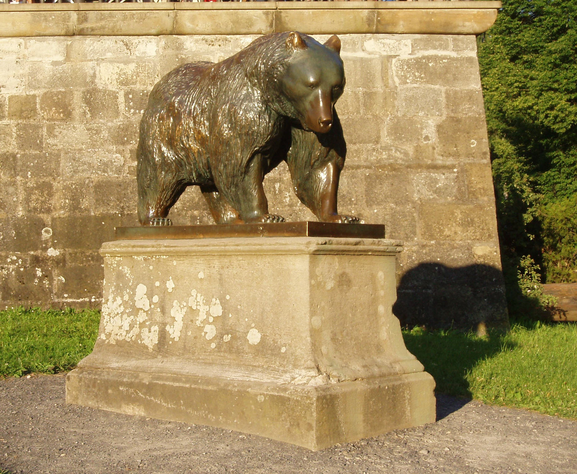 Bärenfigur von L. Kerzinger-Werth